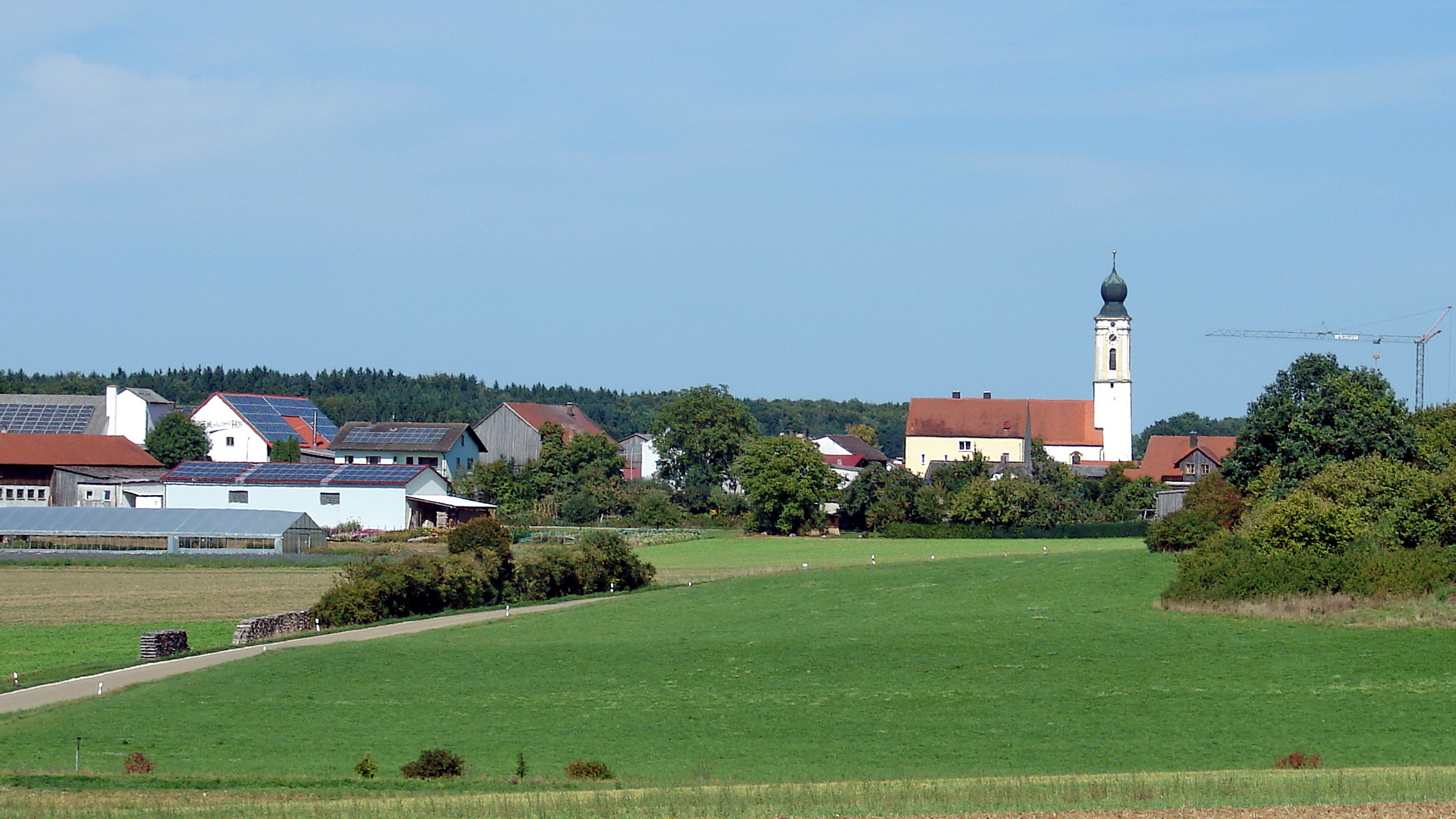 Tettenwang ist ein Dorf und Ortsteil des Marktes Altmannstein im oberbayerischen Landkreis Eichstätt.